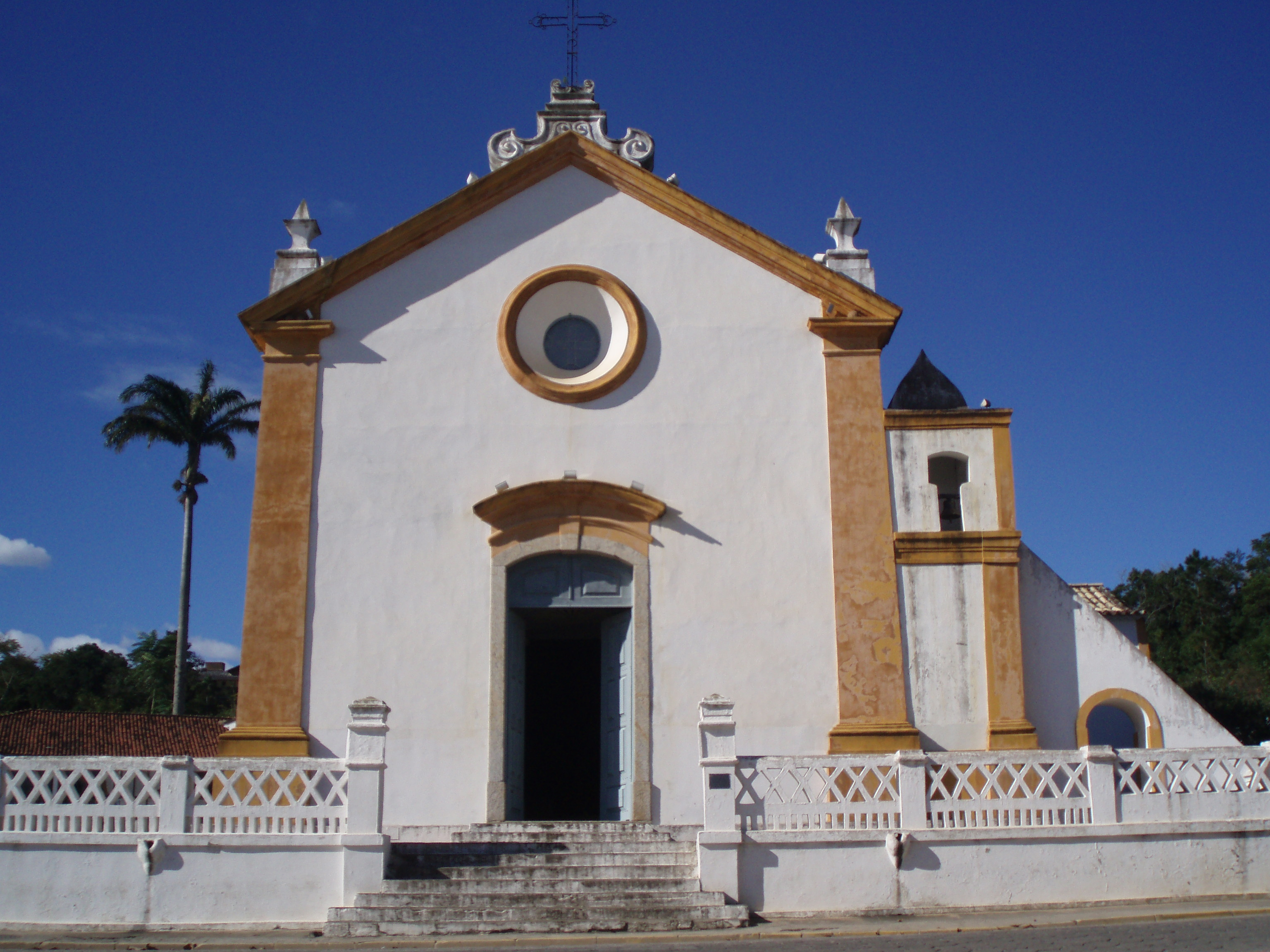 Vue de la façade de l'église de Santo Antônio de Lisboa, Florianópolis, Brésil